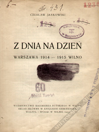 Czesław Jankowski Z dnia na dzień. Warszawa 1914 - 1915 Wilno; Wilno 1923, Wyd. Kazimierza Rutskiego